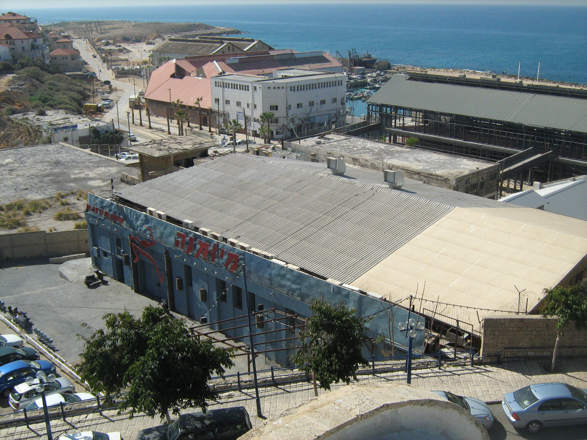 ההנגר של להקת מיומה ביפו ונמל יפו ברקע